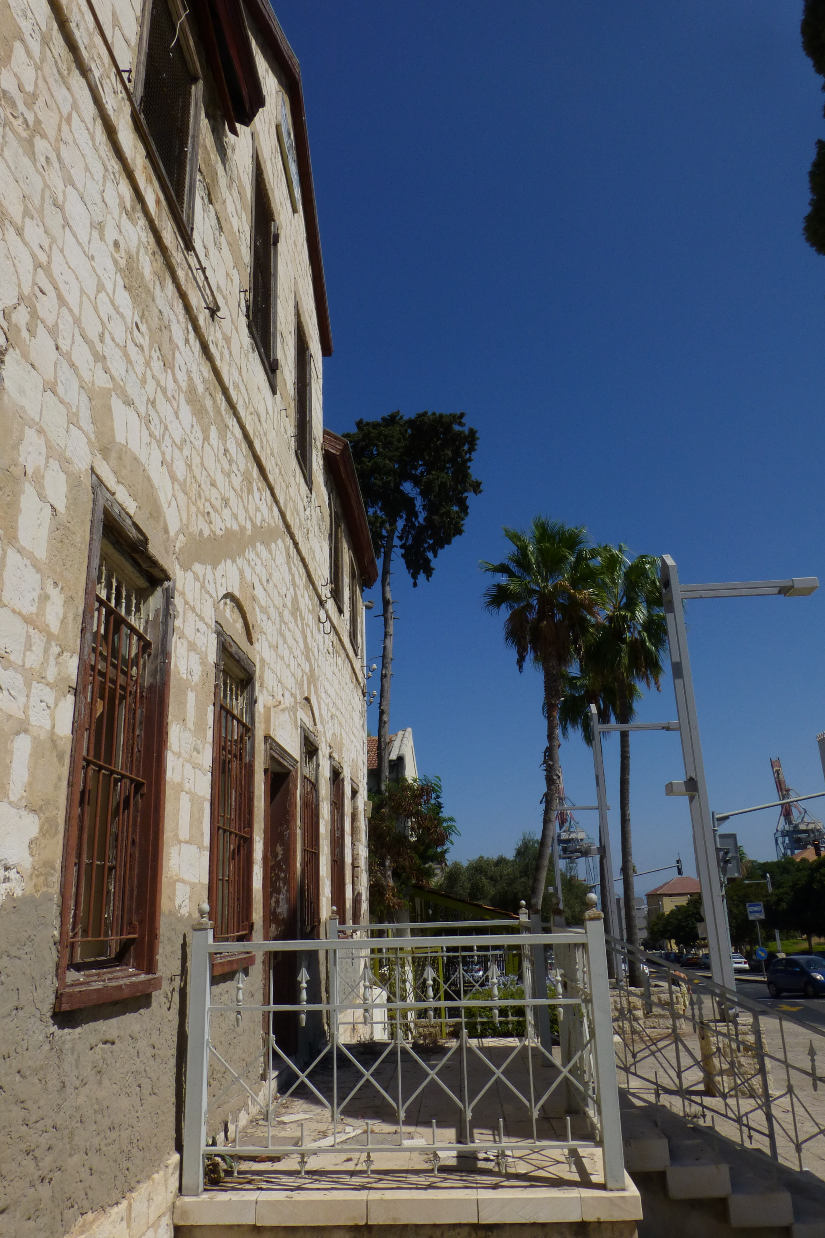 בית אוליפנט. שדרות בן-גוריון 16, המושבה הגרמנית, חיפה